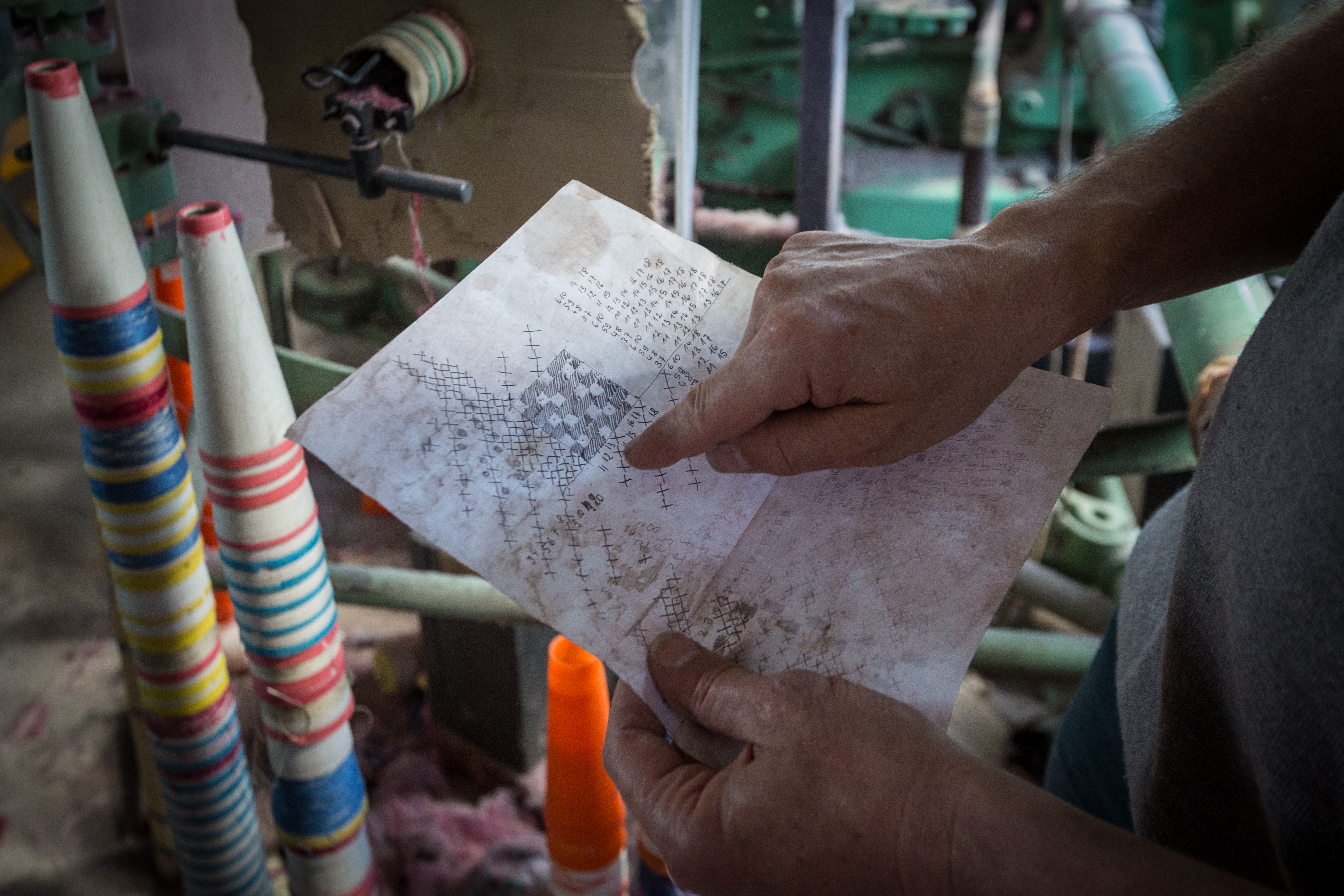 Préparation du motif. A gauche, une pile de cônes vides restant des bobines vides. Atelier de tissage Michel Gander - Muttersholtz mai 2015